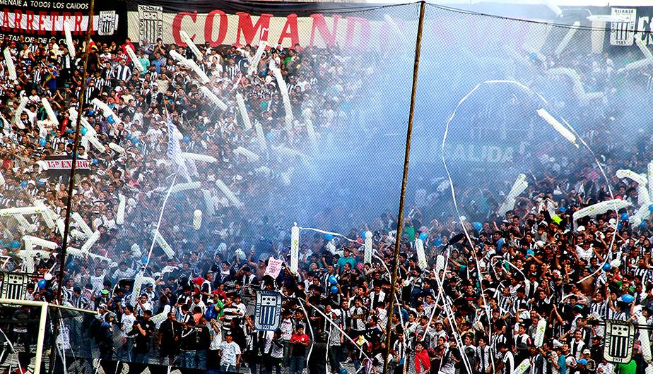 El ´´Comando Sur´´ de Alianza Lima